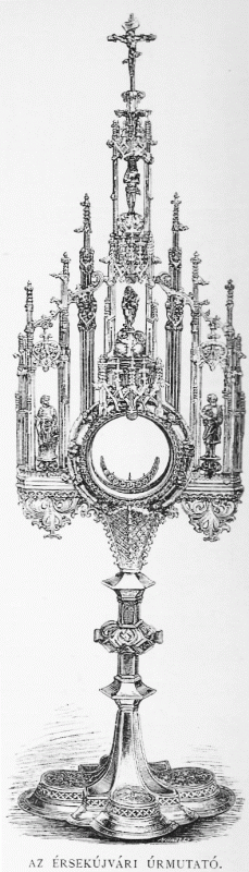 Monstrance of Érsekújvár (Nové Zámky) gift of Pázmány Péter